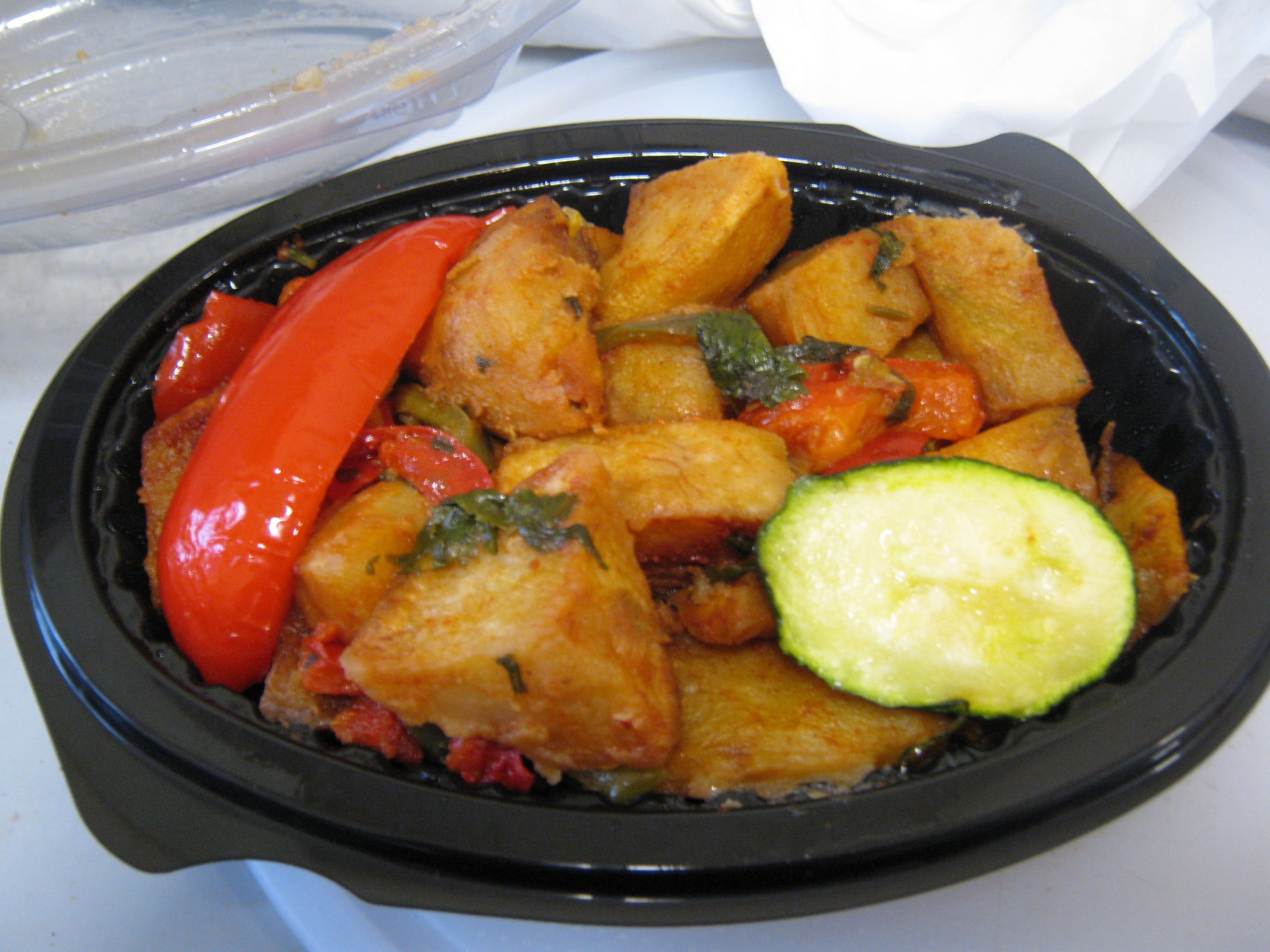 Hiba, SE1.